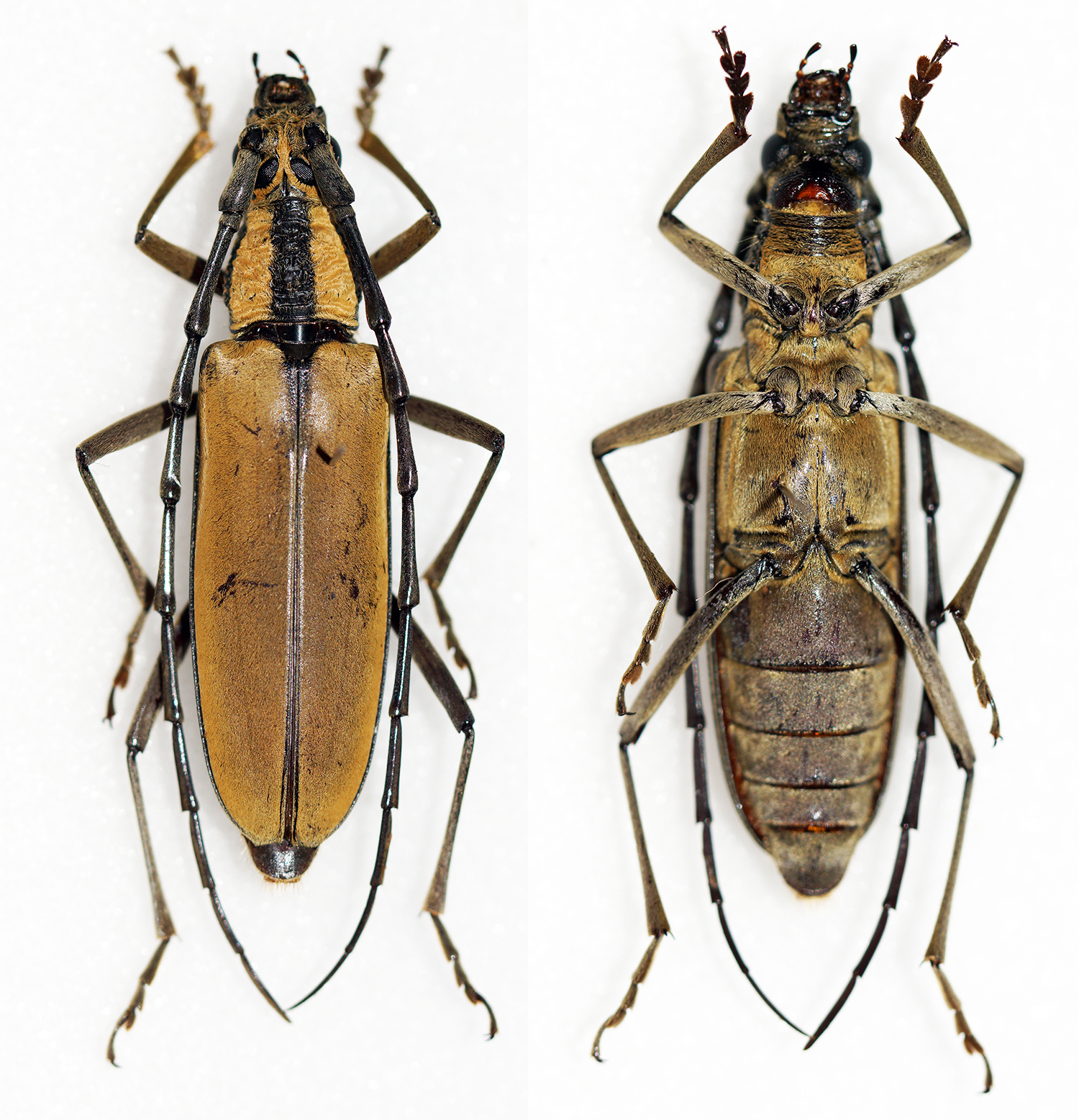 Massicus trilineatus (Pic, 1933) det. F. Vitali Sex: Female Data: Bato Mts - Quang Ngai prov - Vietnam Size: ?